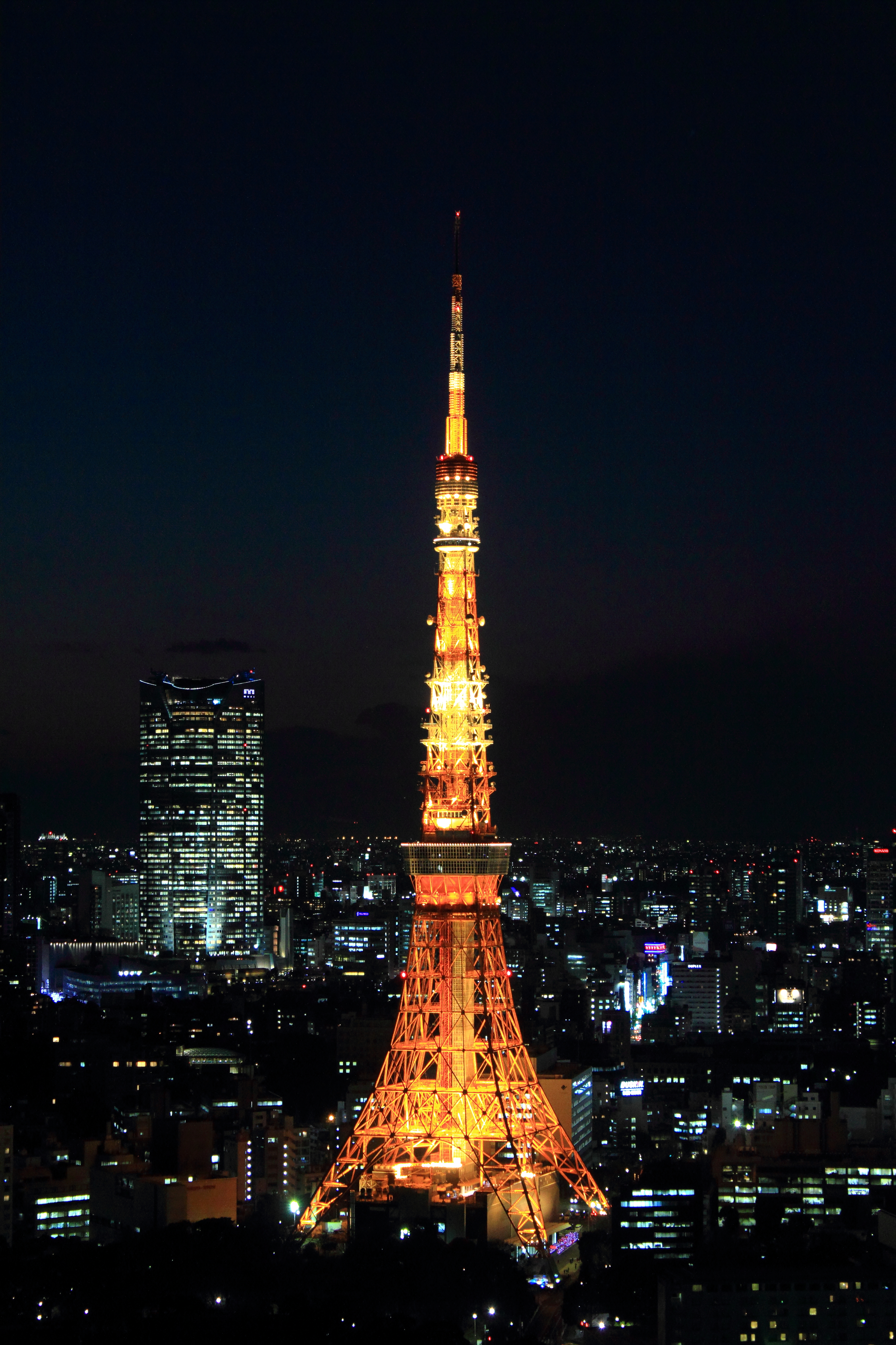 東京タワー（浜松町貿易センタービルより）